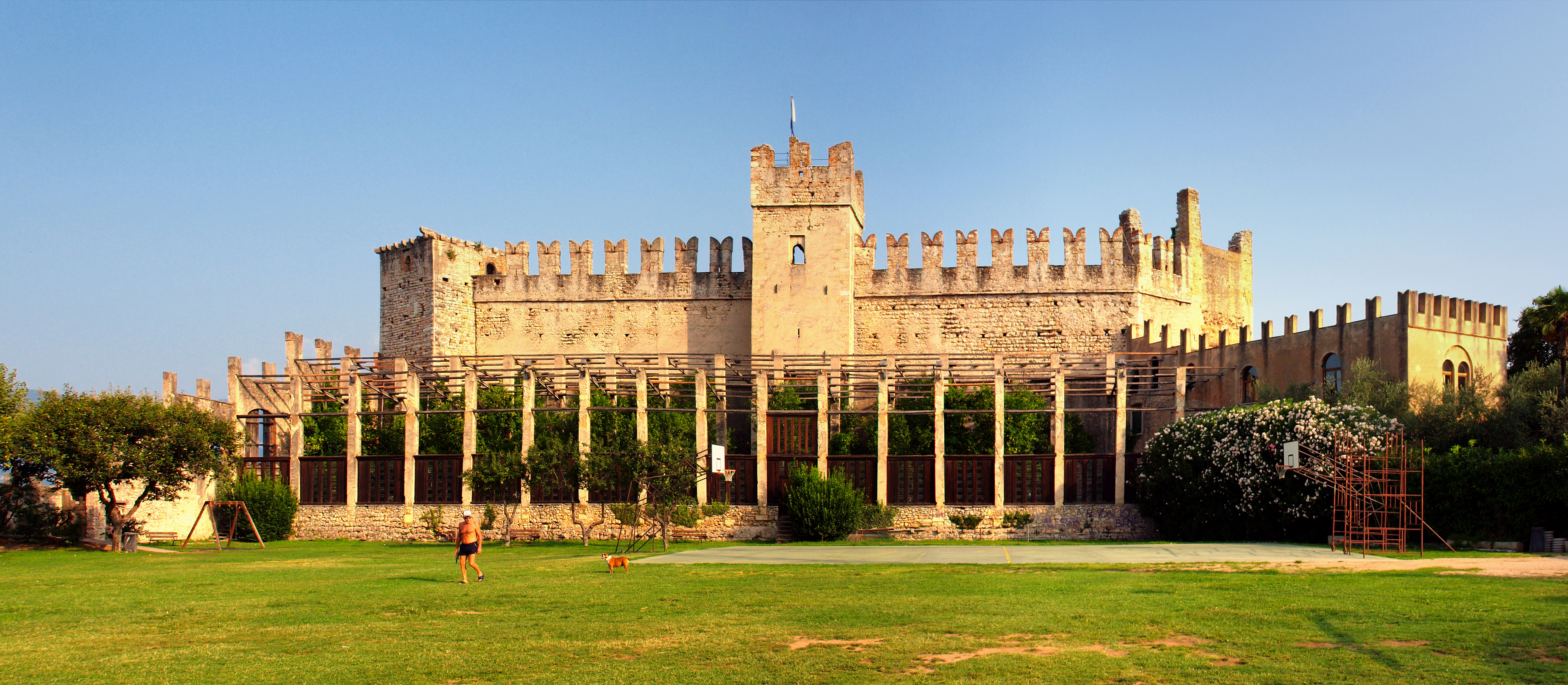 Torri del Benaco - Château des Della Scala